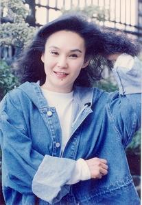 台灣演員及電視製作人胡錦在台視廣場留影。